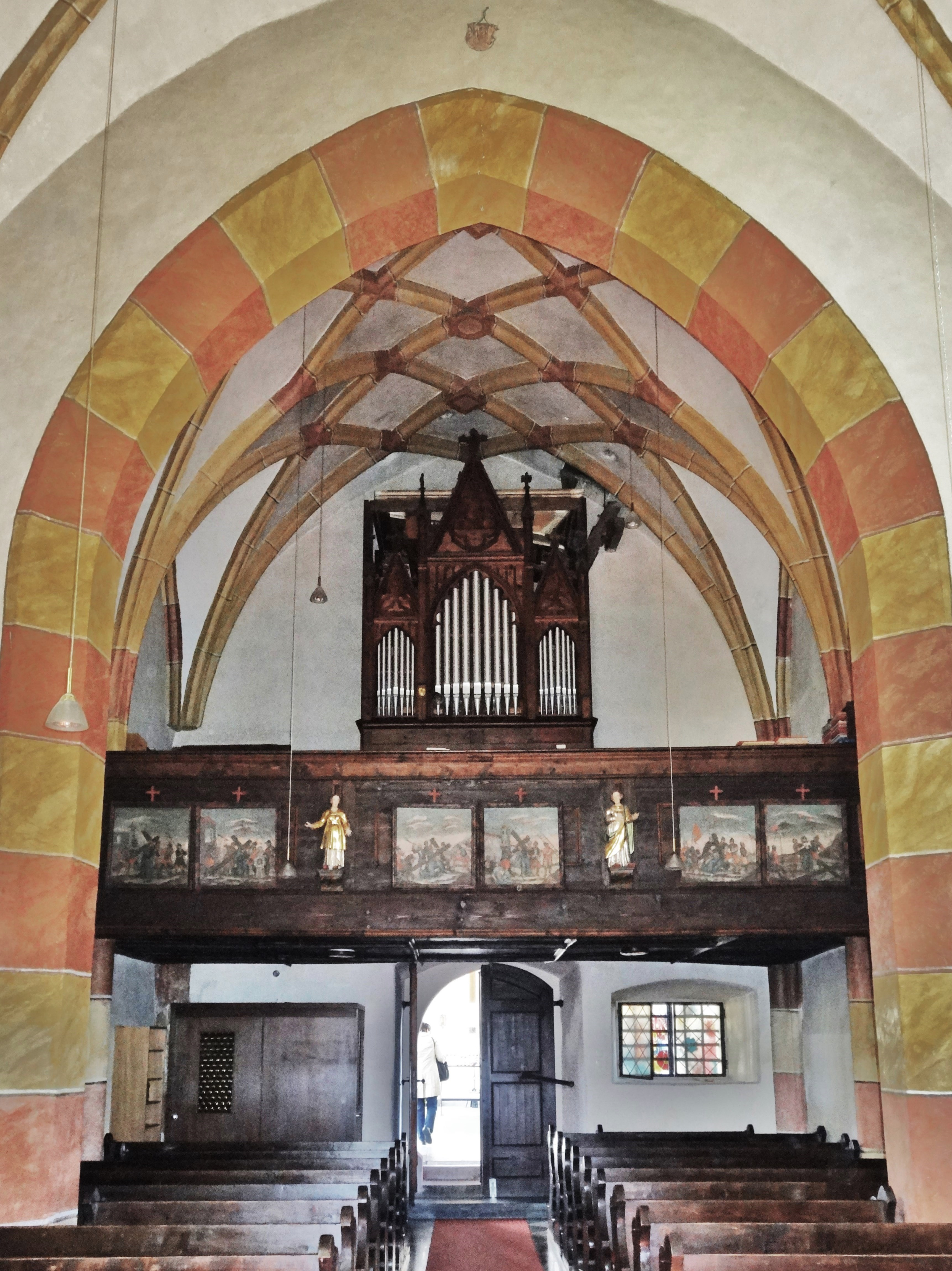 Kath. Pfarrkirche Hl. Andreas Thörl-Maglern, Innenansicht gegen die Orgelempore